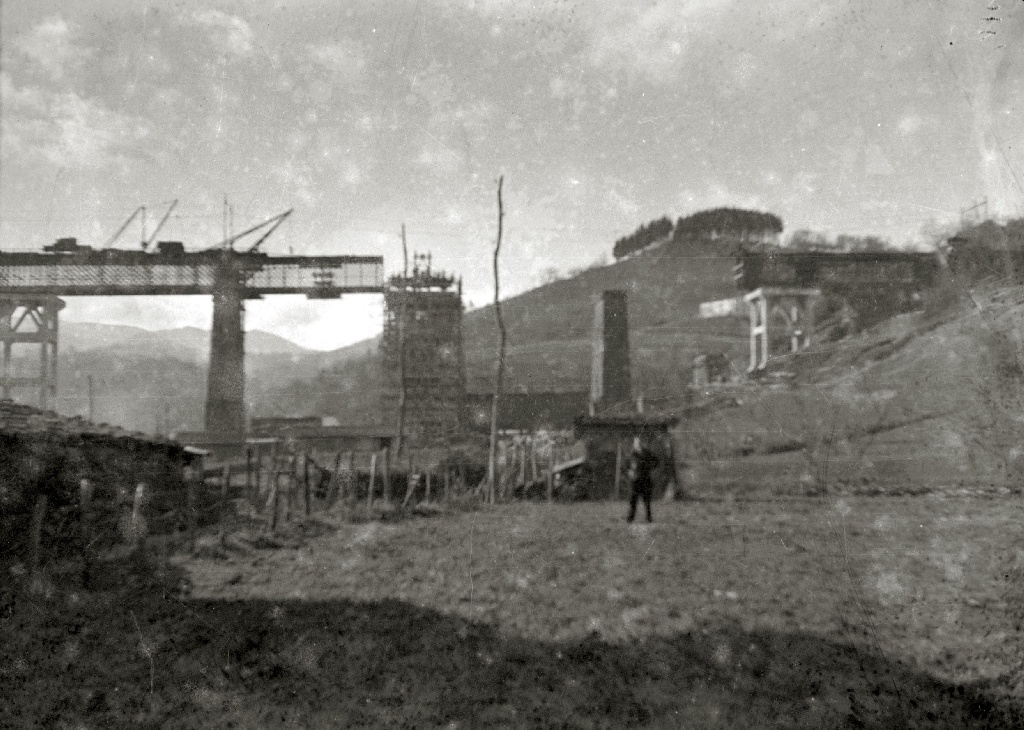 Título original: Obras de reconstrucción del víaducto de Ormaiztegi (2/2) Localización: Ormáiztegui (Guipúzcoa)